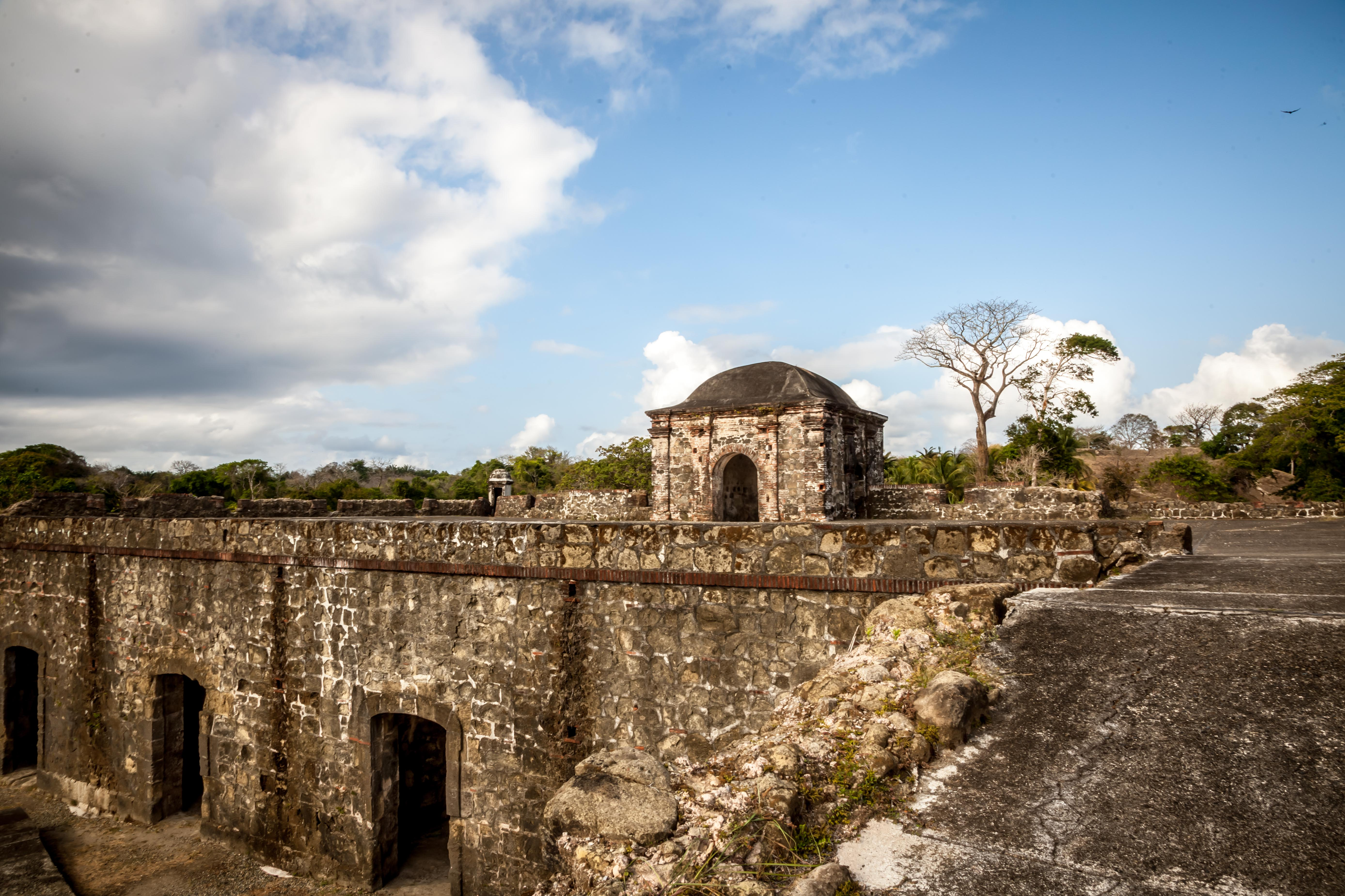 Castillo de San Lorenzo, el Real de Charges. Colón, Panamá.